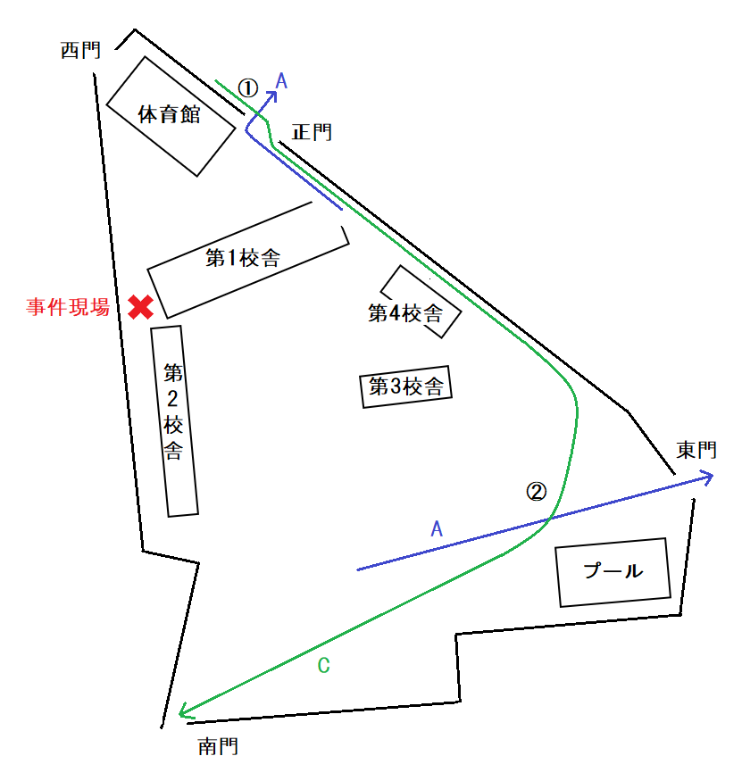 jp:柏の少女殺し事件の現場見取り図